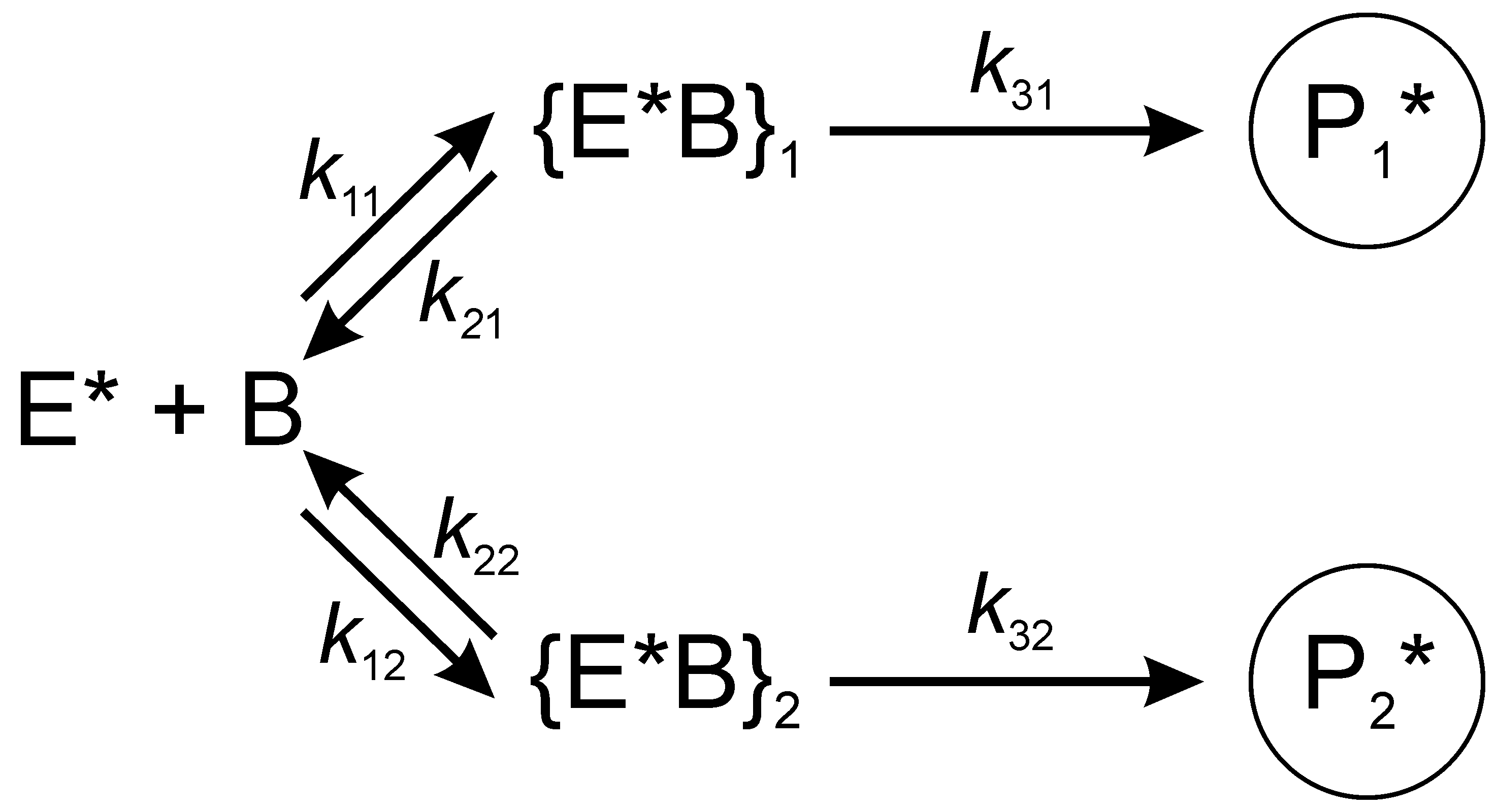 Isoinversionsprinzip